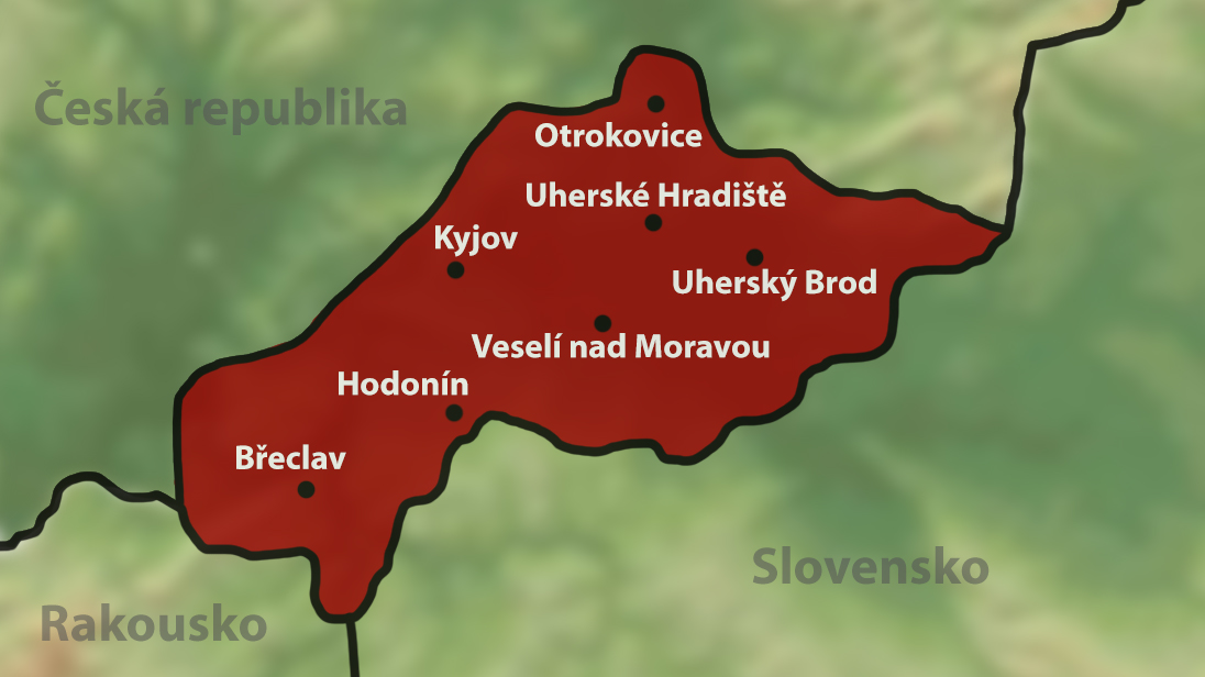 Schematická mapa etnografickej oblasti Slovácko